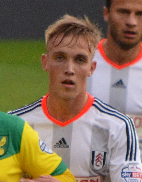 Fulham v Norwich (2014)